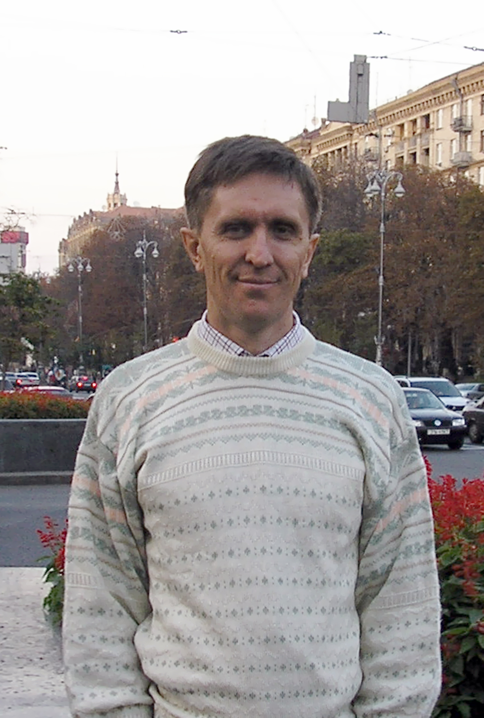 Алексей Марковский